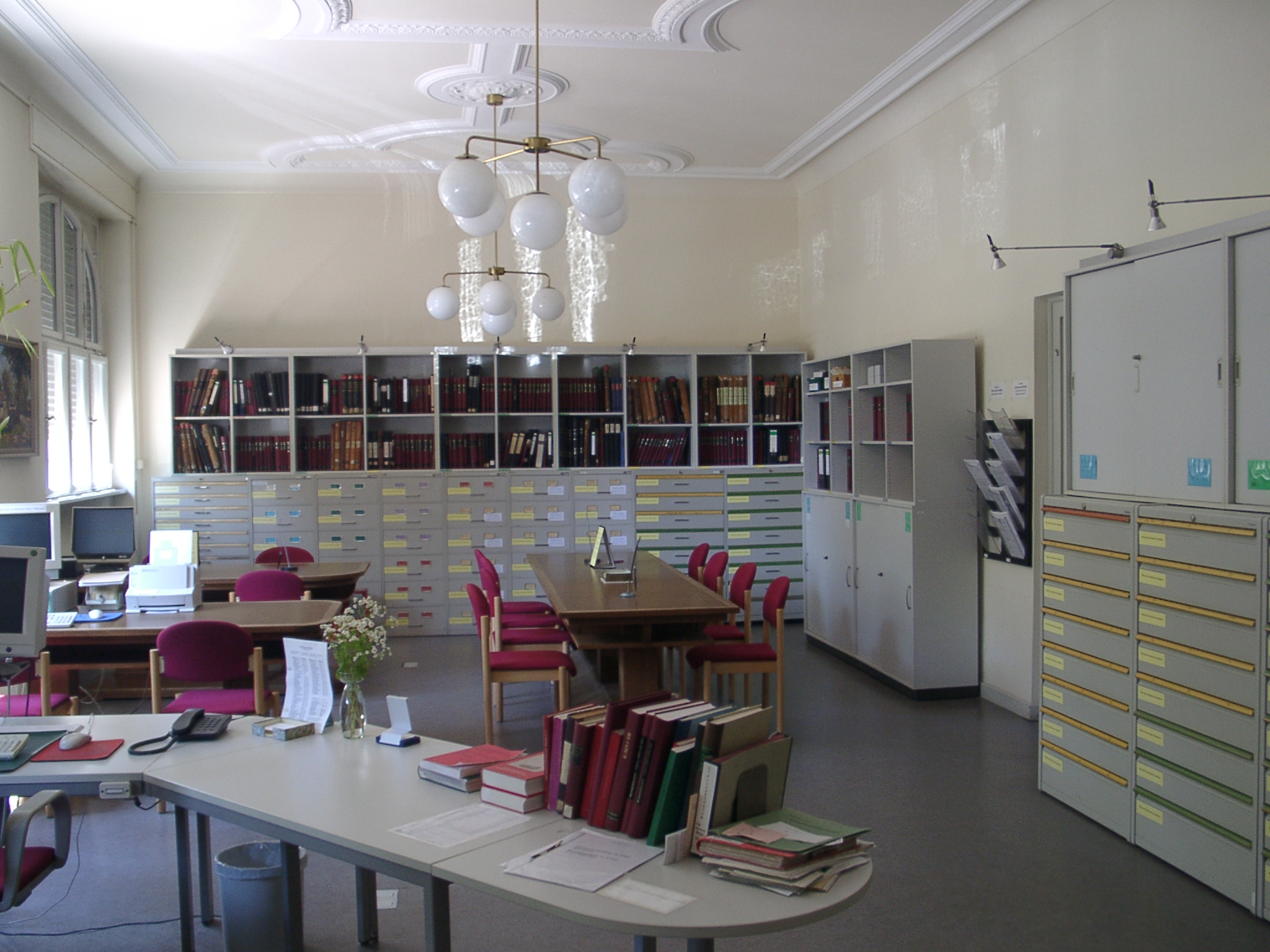 Repertoriensaal im Generallandesarchiv Karlsruhe selbst fotografiert (Klaus Graf) 23.6.2005 first uploaded on de-WP: 00:59, 24. Jun 2005 Benutzer:Historiograf